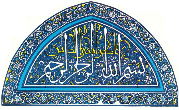 نموذج من الزخرفة الفارسية القاشانية